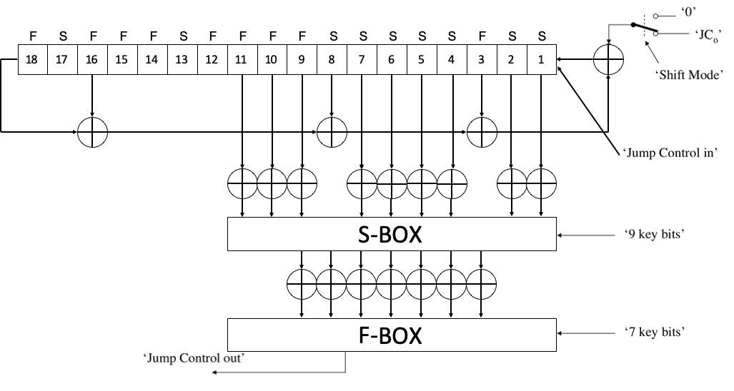 Схема секции регистра перехода, который используется при реализации шифра Pomaranch